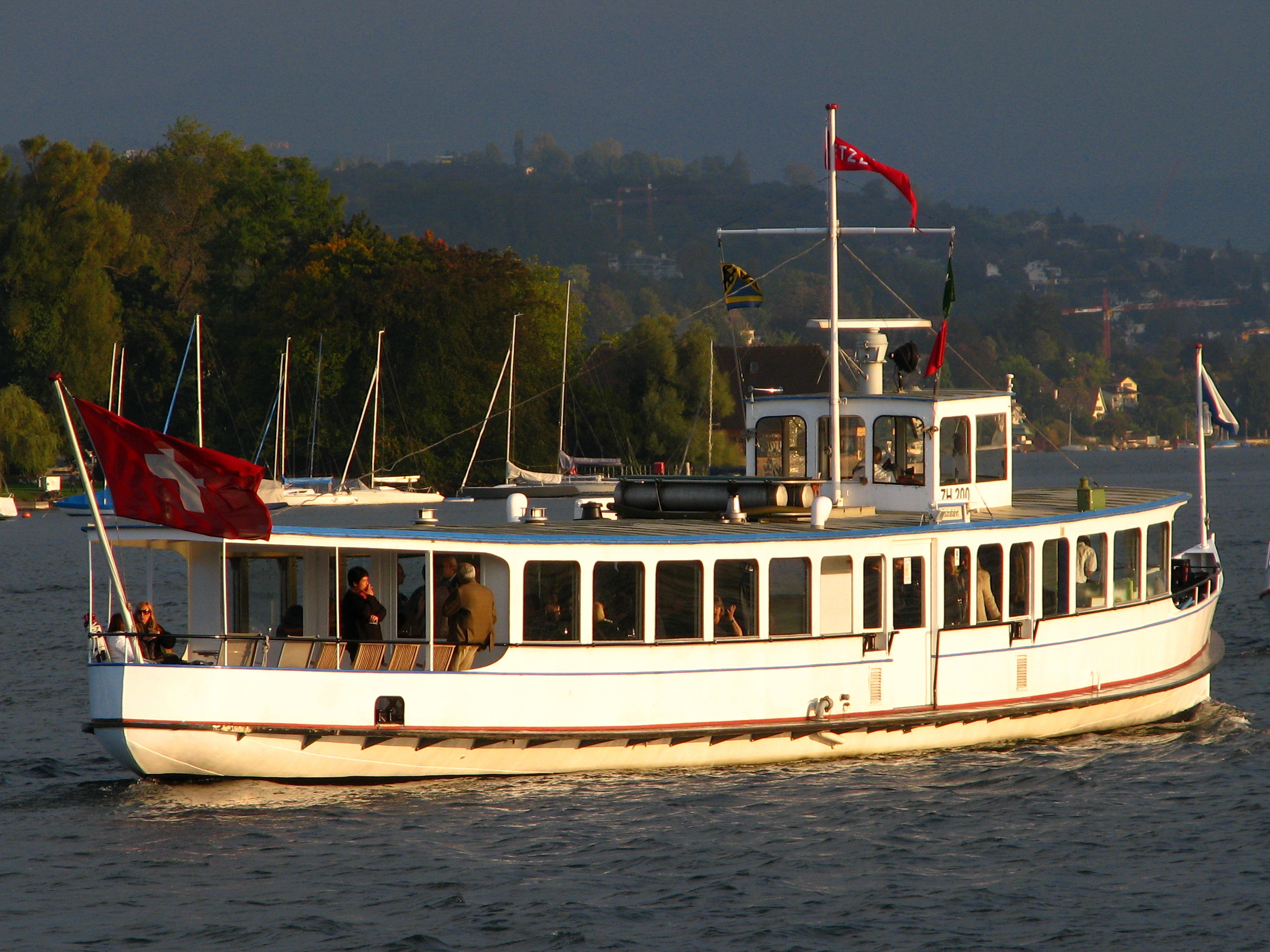 Former Zürichsee-Schifffahrtsgesellschaft (ZSG) MS Etzel on Zürichsee at Fischerstube in Zürich-Seefeld (Switzerland)